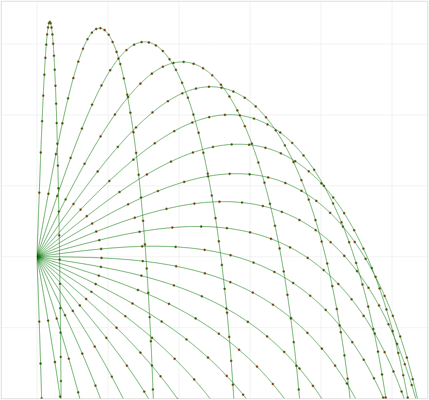 Na obrázku je sada křivek modelujících setrvačný pohyb tělesa ve svislém gravitačním poli při uvažování odporu prostředí. Křivky odpovídají drahám stejných těles o stejně velké počáteční rychlosti vypuštěných pod různými náměry. Na křivkách jsou vyznačeny body označující stejně dlouhé časové úseky.